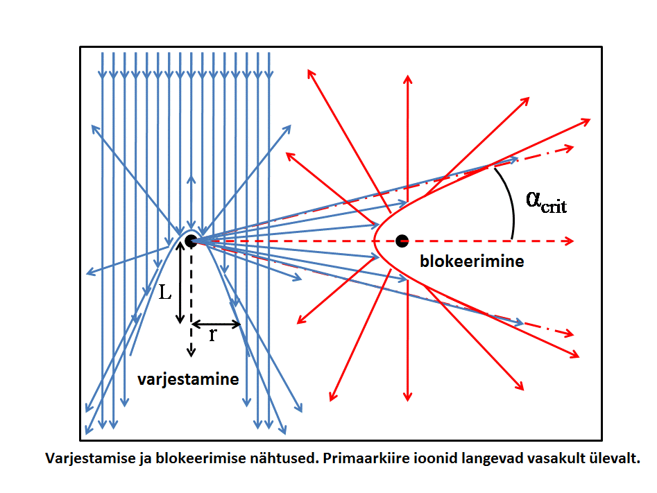 Varjestavad ja blokeerivad nähtused